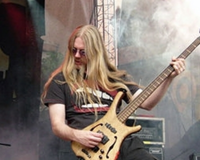 Marco Tapani Hietala